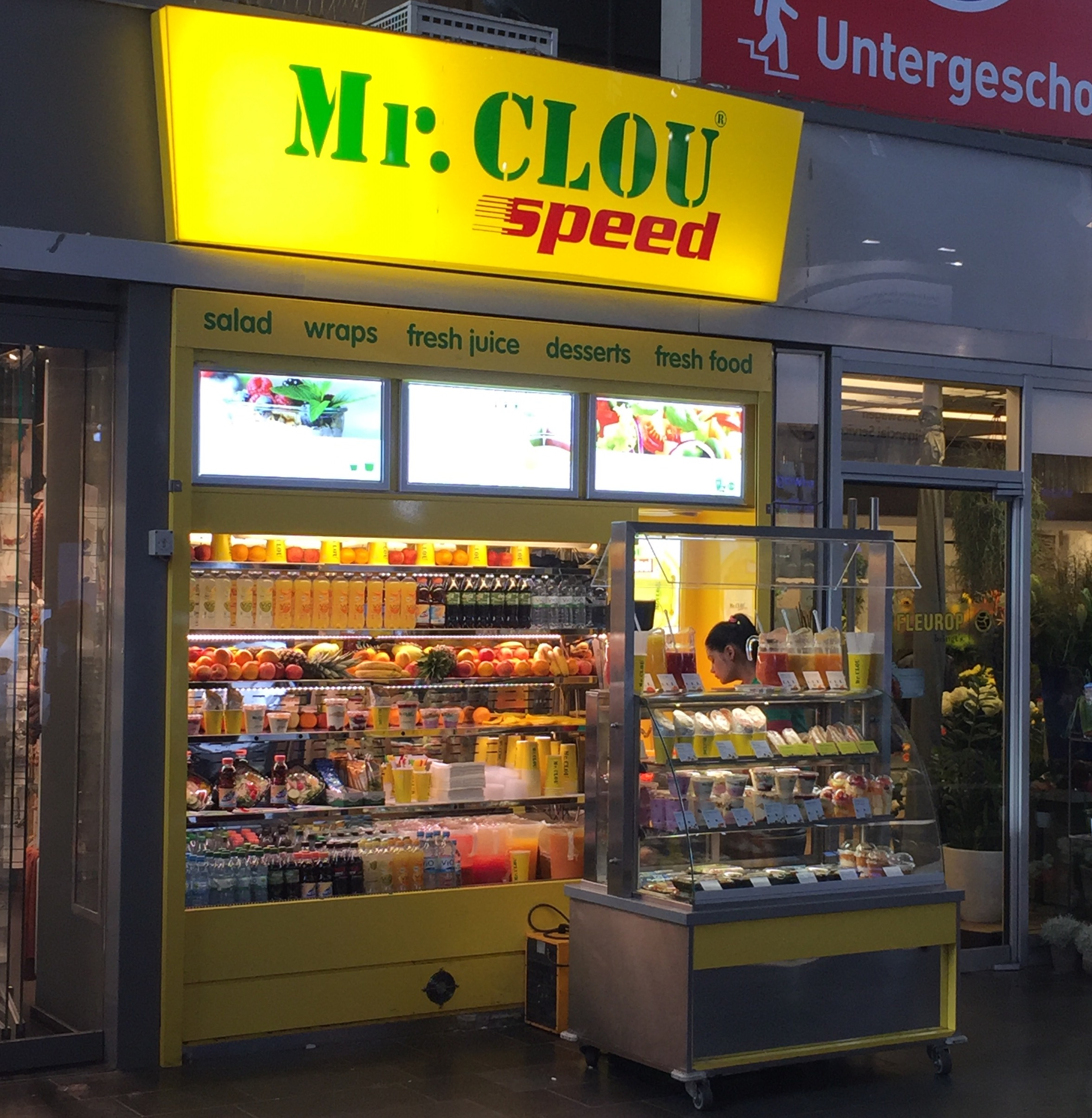 Mr Clou express